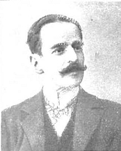 Retrato de Gonzalo de Figueroa y Torres, conde de Mejorada del Campo, publicado en la revista española Nuevo Mundo.